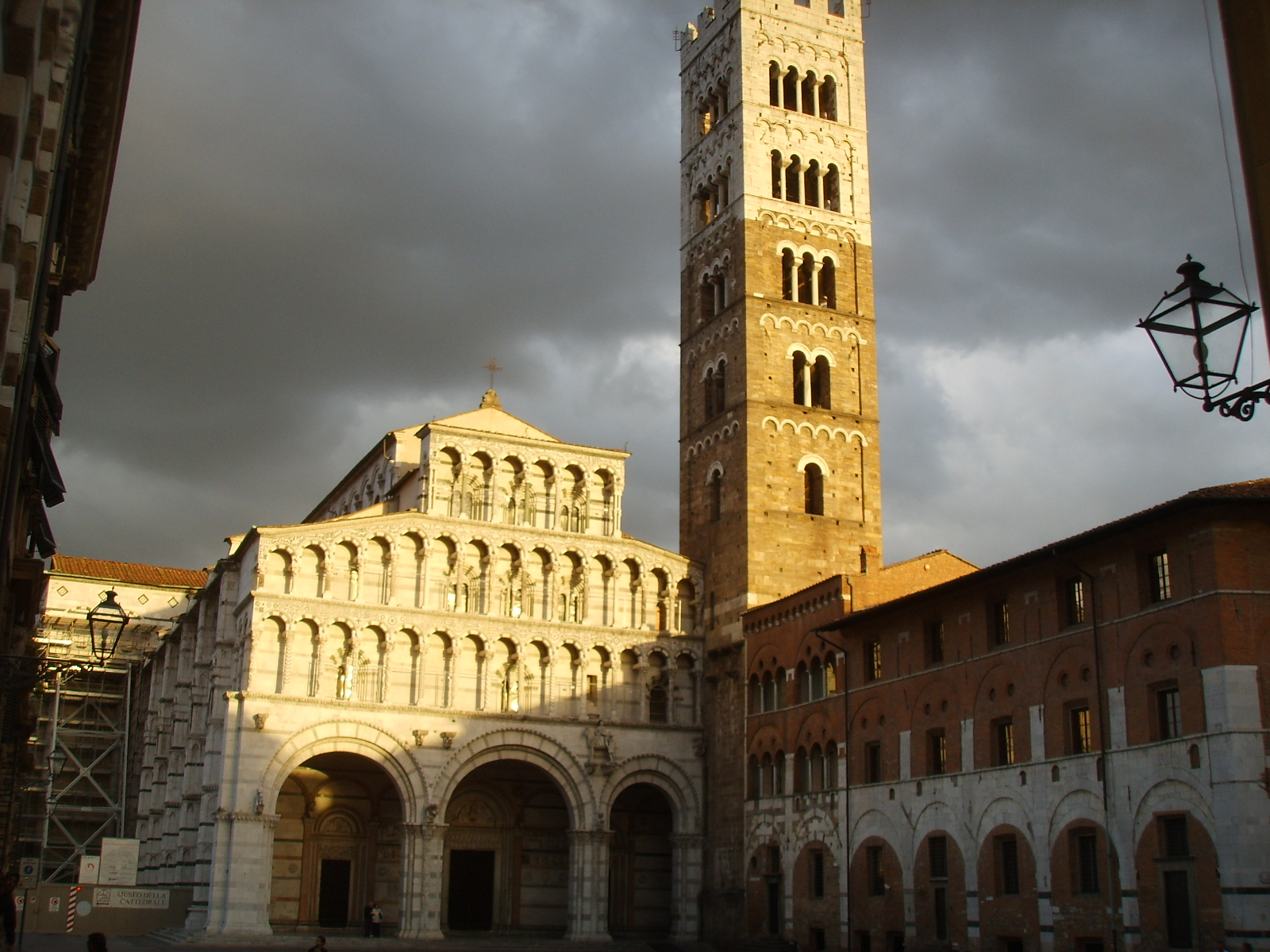 Duomo di lucca